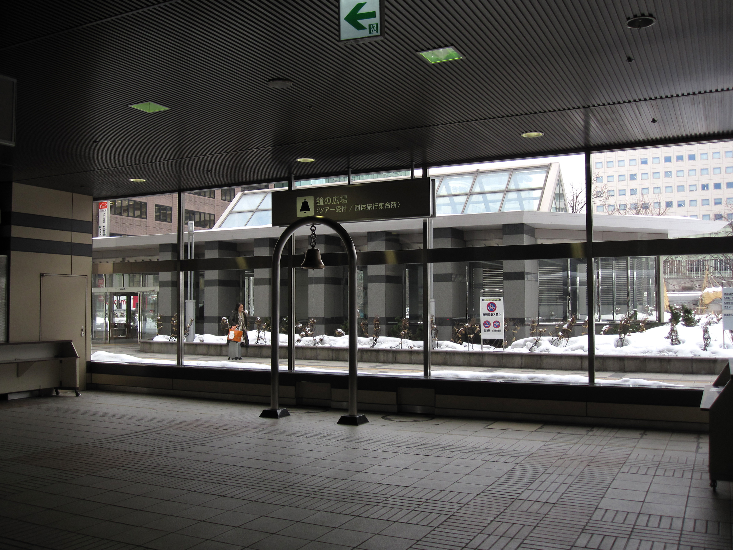 札幌駅鐘の広場（JR北海道函館本線）